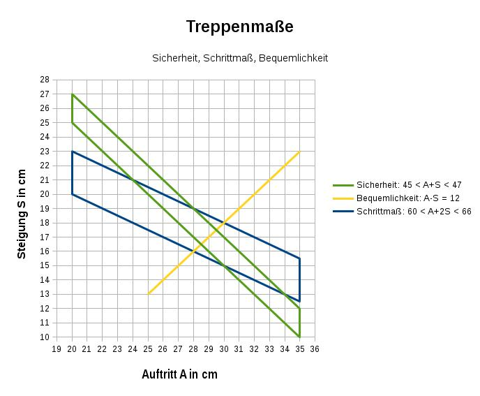 graphische Darstellung der wichtigsten Regeln für Treppen